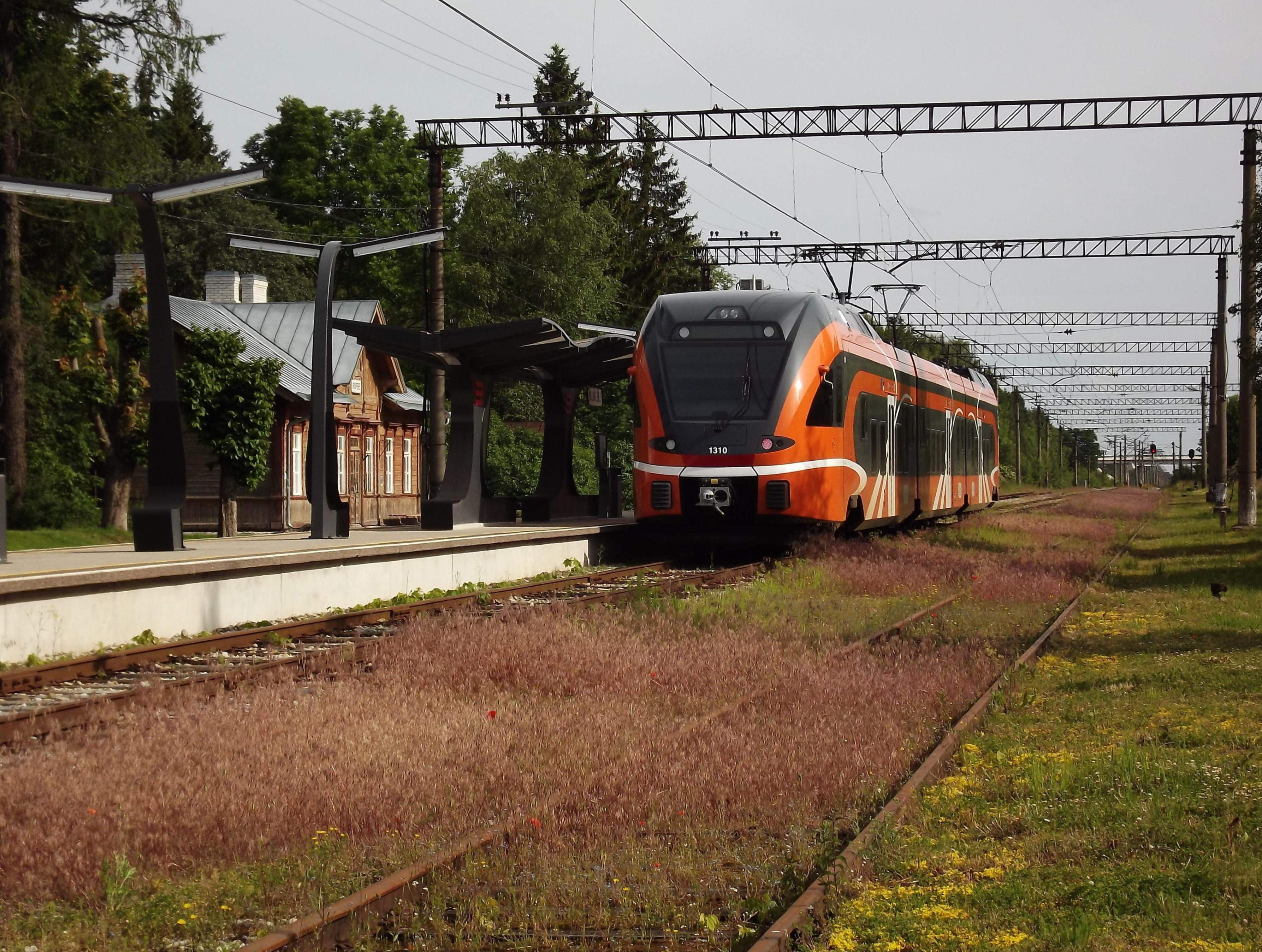 Elektrirong Stadler FLIRT EMU 1310 "Kedder" Riisipere jaamas.